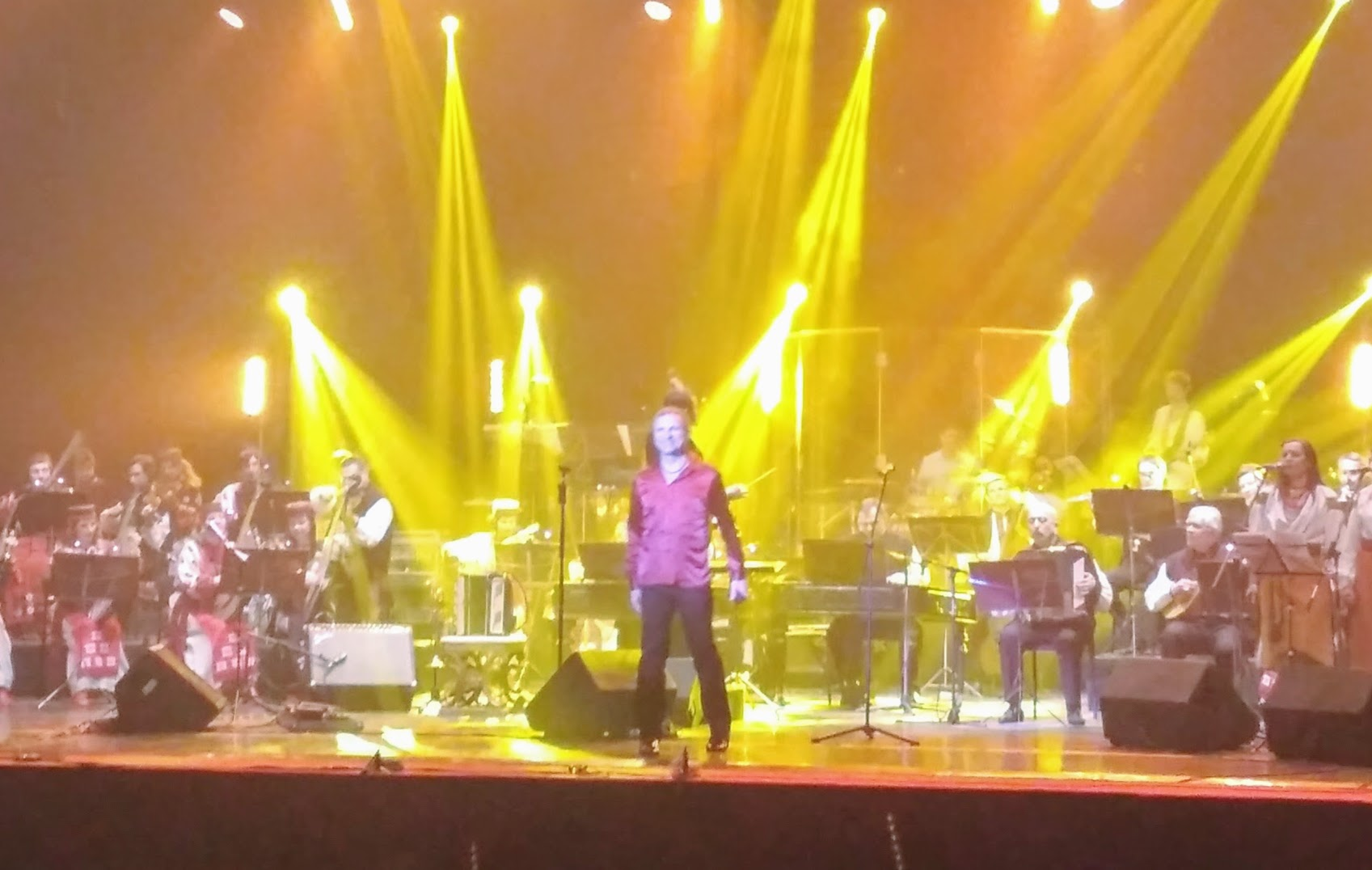 Олег Скрипка на концерті в Дніпрі